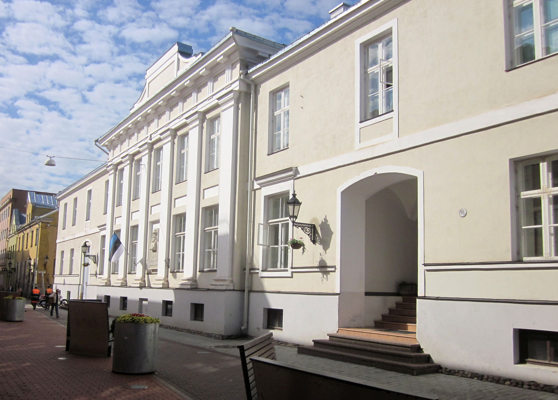 Tartu Hugo Treffneri Gümnaasium